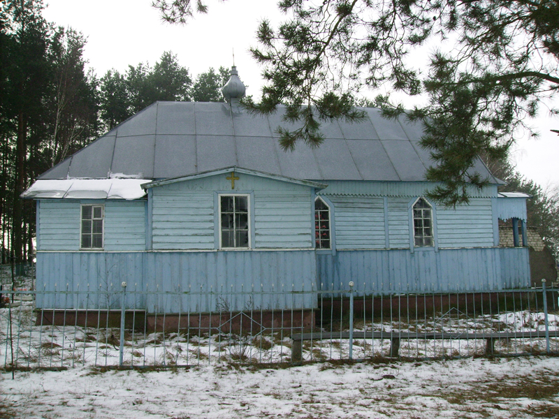 Церква св. Андрія Первозванного в с. Одринки, Сарненського р-ну, Рівненської обл., яка була збудована приблизно в 1988 році.